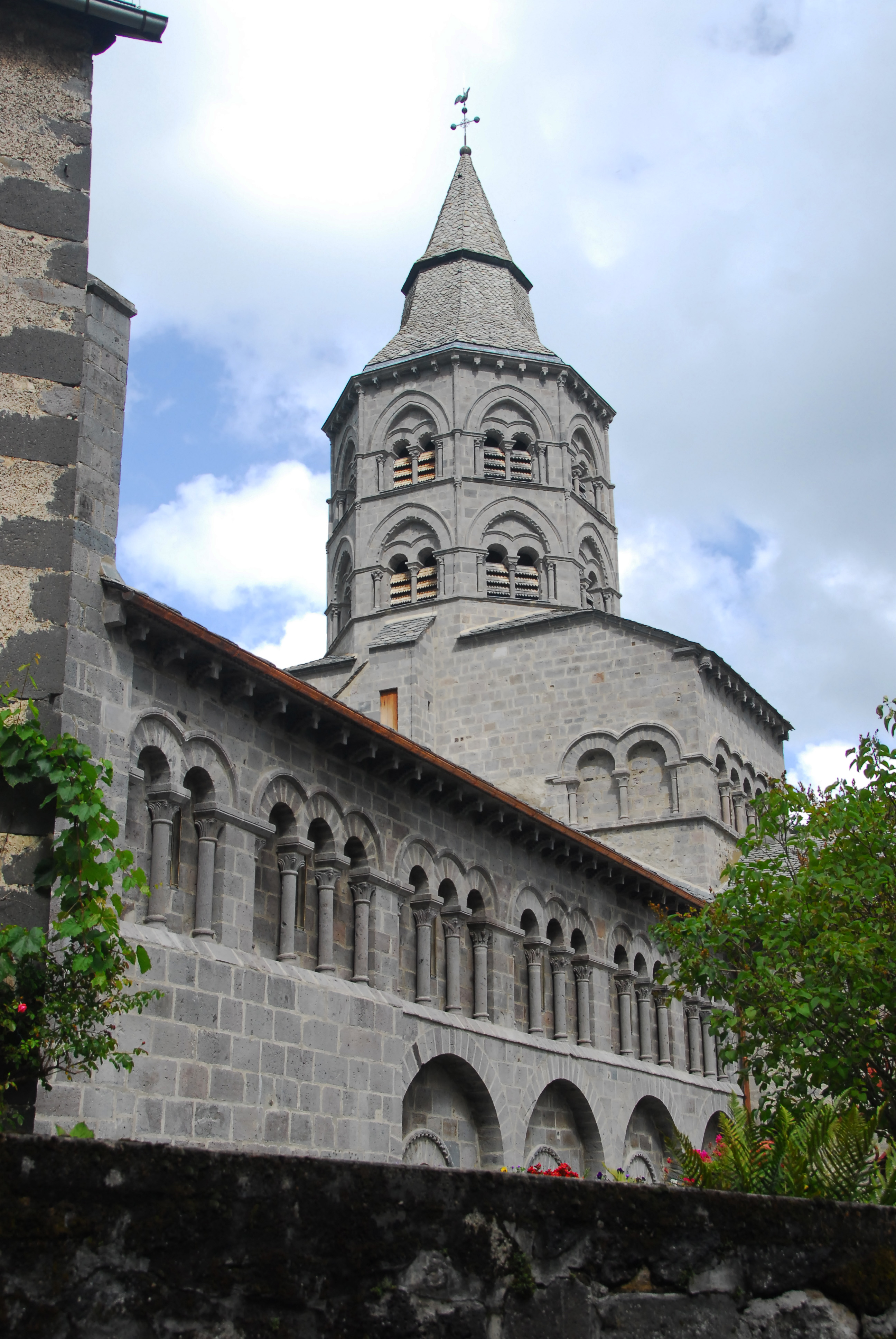 N.-D.d'Orcival, Langhaus und Turm von SW